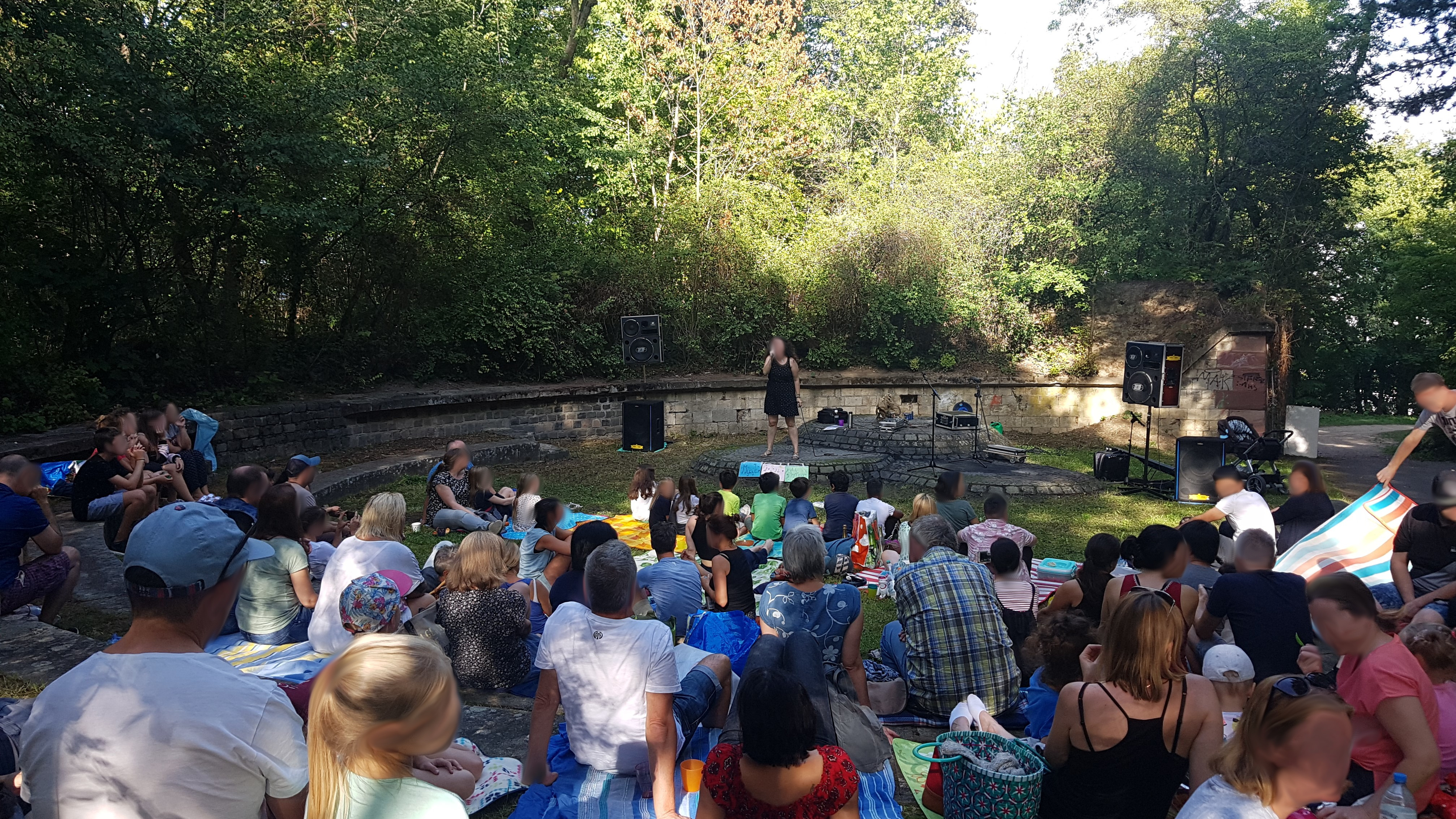 Am 15. September 2019 trat eine Sängerin im Hartenberg-Park auf, was zur Ansammlung etlicher Zuhörer führte